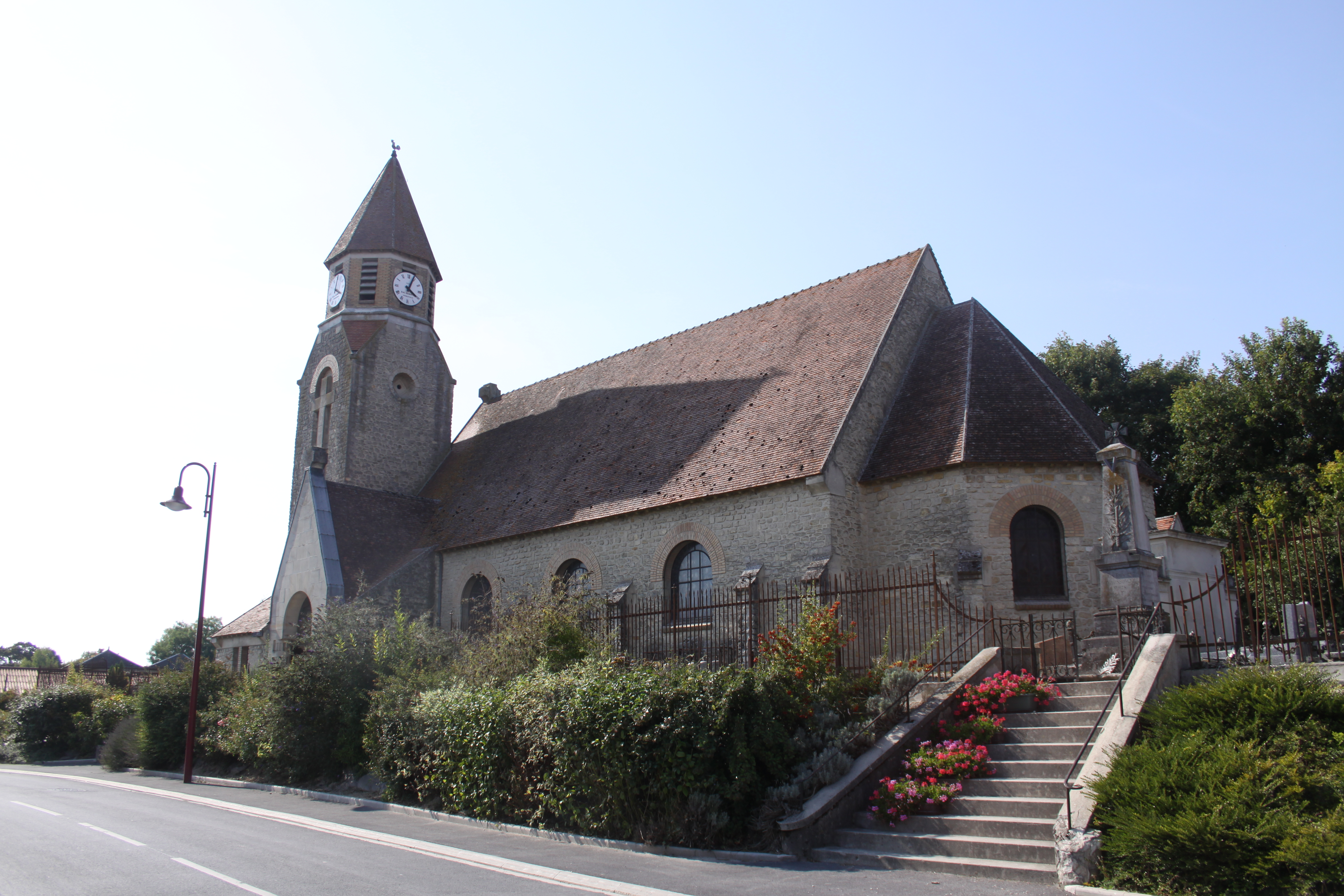 Village Ardennais